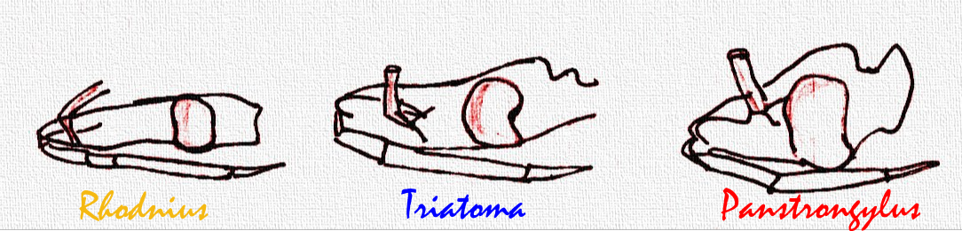 Trés géneros más importantes epidemiológicamente.